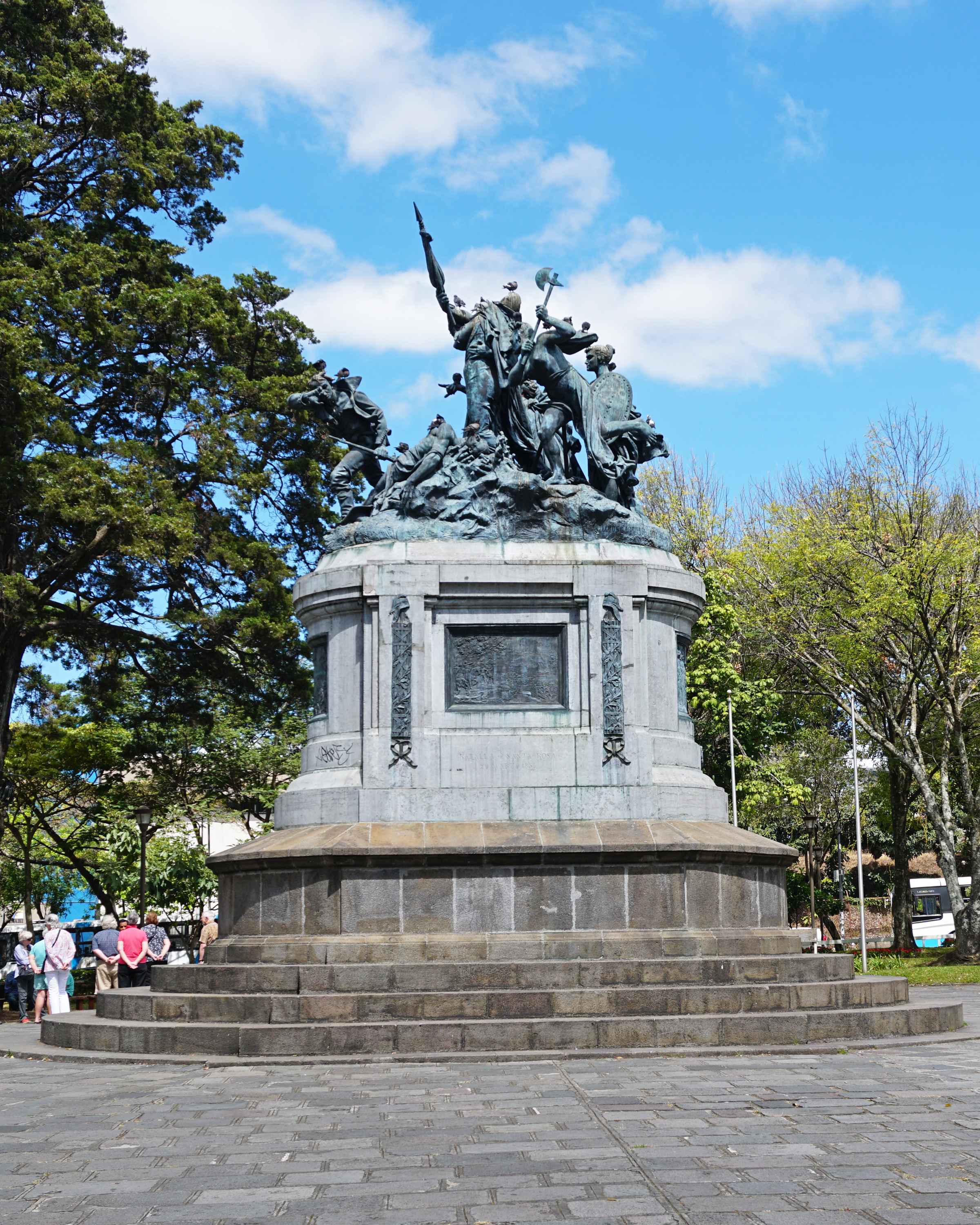 Monumento Nacional de Costa Rica, Parque Nacional, San José